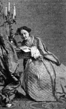 Селина Лефрен, возлюбленная Н. Некрасова. Источник: «Степина М. Ю. Некрасов и Селина Лефрен-Потчер: Комментарии к реконструкции эпизода биографии // Некрасовский сборник. — СПб.: Наука. — Т. XIV. — С. 182. — 288 с.». Фото из Государственного Литературного музея, около 1863-го года.